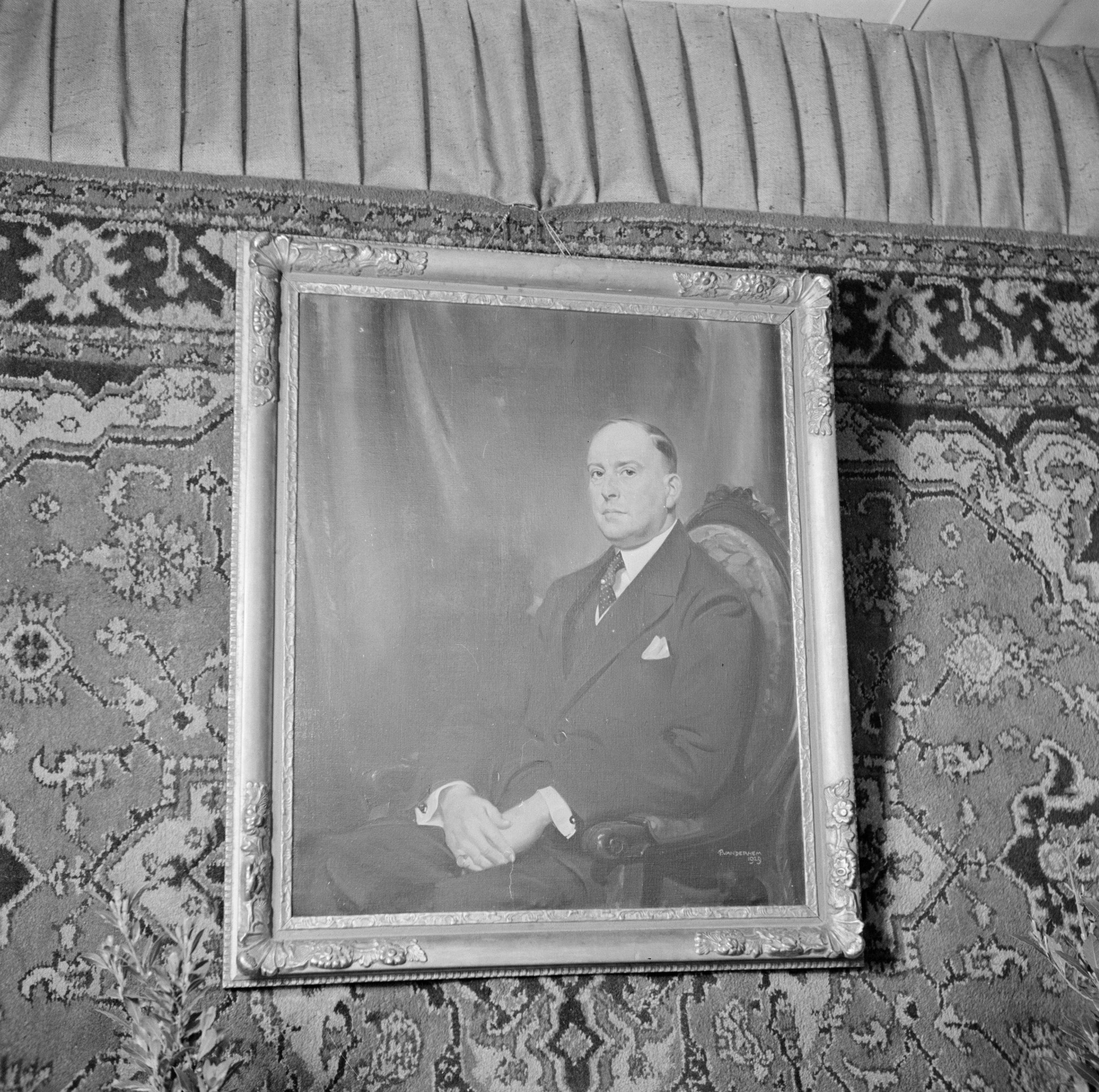 Collectie / Archief : Fotocollectie Van de Poll Reportage / Serie : Oorlogsvrijwilligers in Malakka en Indonesië Beschrijving : Portret van Henri van Abbe door Piet van der Hem, 1929 Datum : februari 1946 Trefwoorden : portretten, schilderijen Persoonsnaam : Abbe, Henri van Fotograaf : Poll, Willem van de Auteursrechthebbende : Nationaal Archief Materiaalsoort : Negatief (zwart/wit) Nummer archiefinventaris : bekijk toegang 2.24.14.02 Bestanddeelnummer : 255-8430